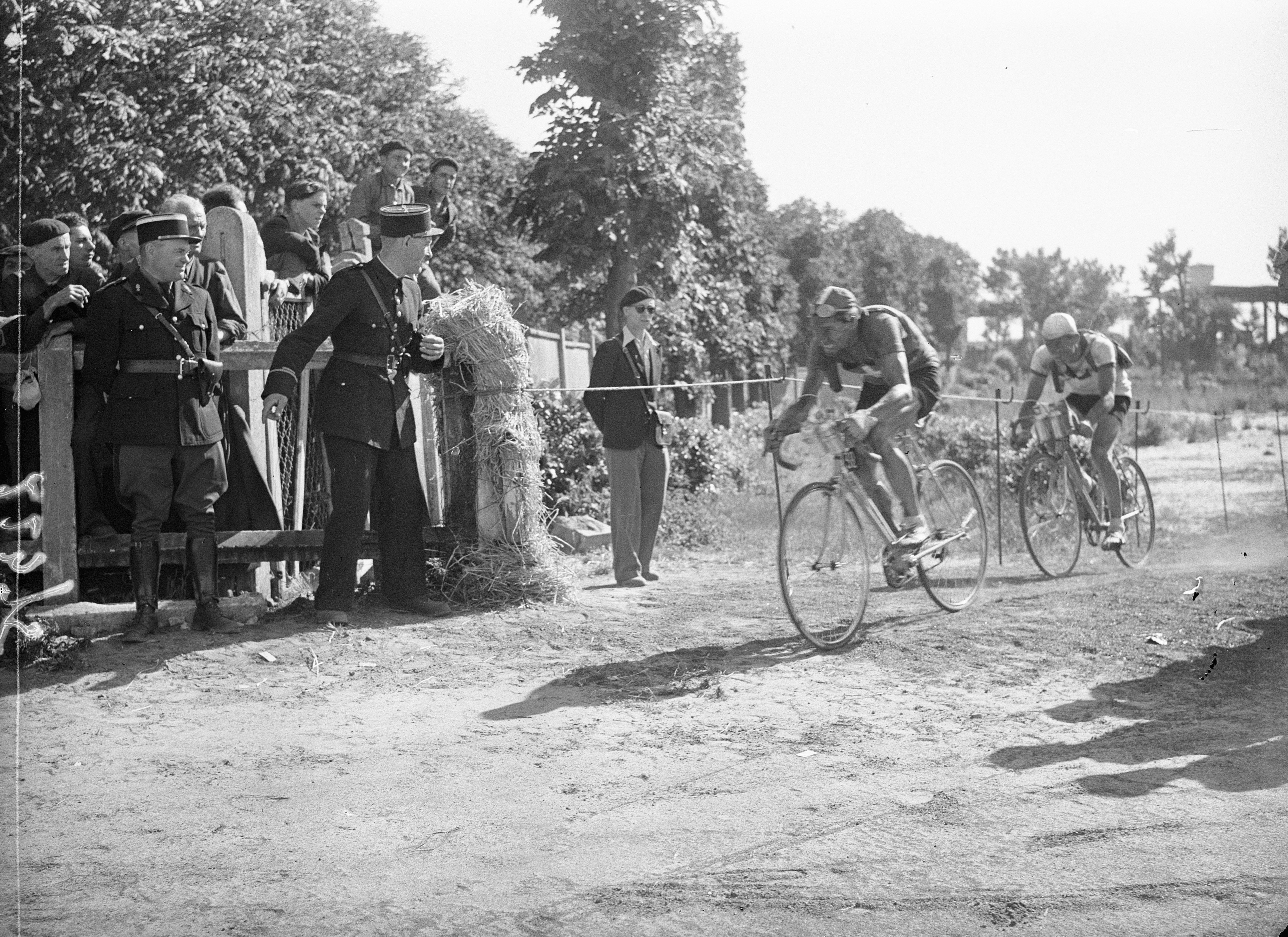 Collectie / Archief : Fotocollectie Anefo Reportage / Serie : Tour de France. Eerste etappe Parijs-Rijssel (Lille) Beschrijving : Nummer een en twee komen binnen, Ferdi Kübler (Zwitserland) en Mahé (Frankrijk) Datum : 25 juni 1947 Locatie : Frankrijk Trefwoorden : sport, wielrennen, wielrennen Fotograaf : Sagers, Harry / Anefo Auteursrechthebbende : Nationaal Archief Materiaalsoort : Glasnegatief Nummer archiefinventaris : bekijk toegang 2.24.01.09 Bestanddeelnummer : 902-2375